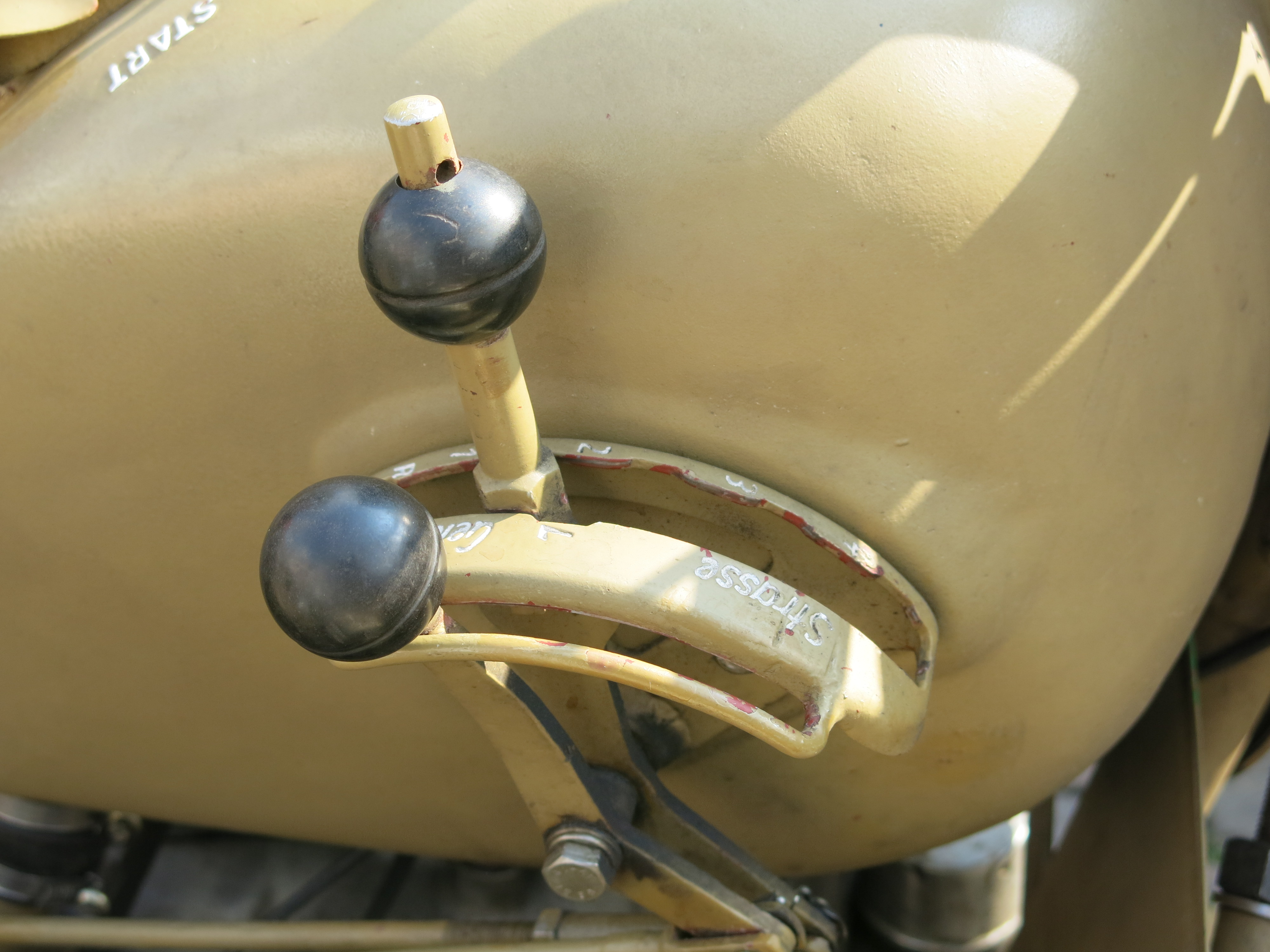 BMW R 75 Wehrmachtsgespann Hand-Schaltung